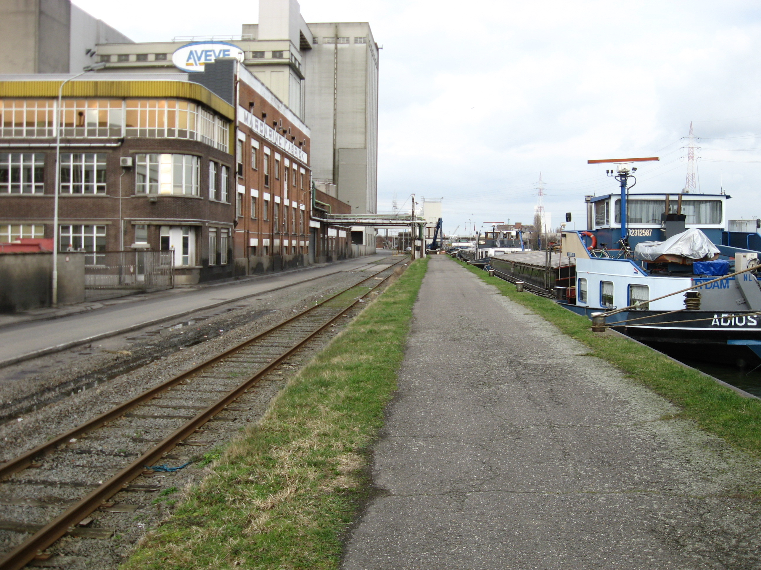 Nu stuk van de havenlijn 220 in Merksem langs het kanaal. Was vroeger tweesporig en was geëxploiteerd door de buurtspoorwegen tot 1967. Links de Aveve-fabriek.